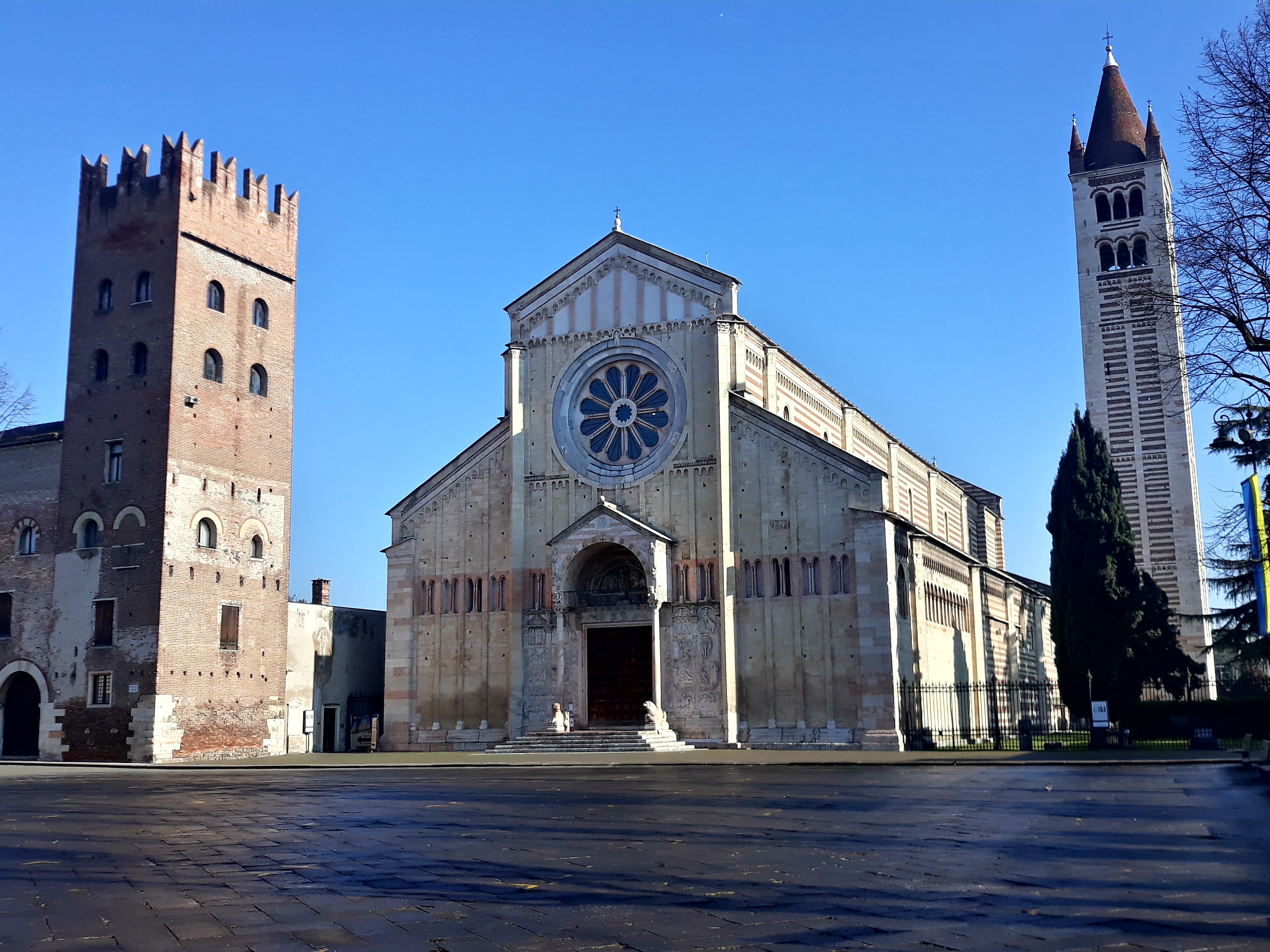 Basilica di San Zeno a Verona